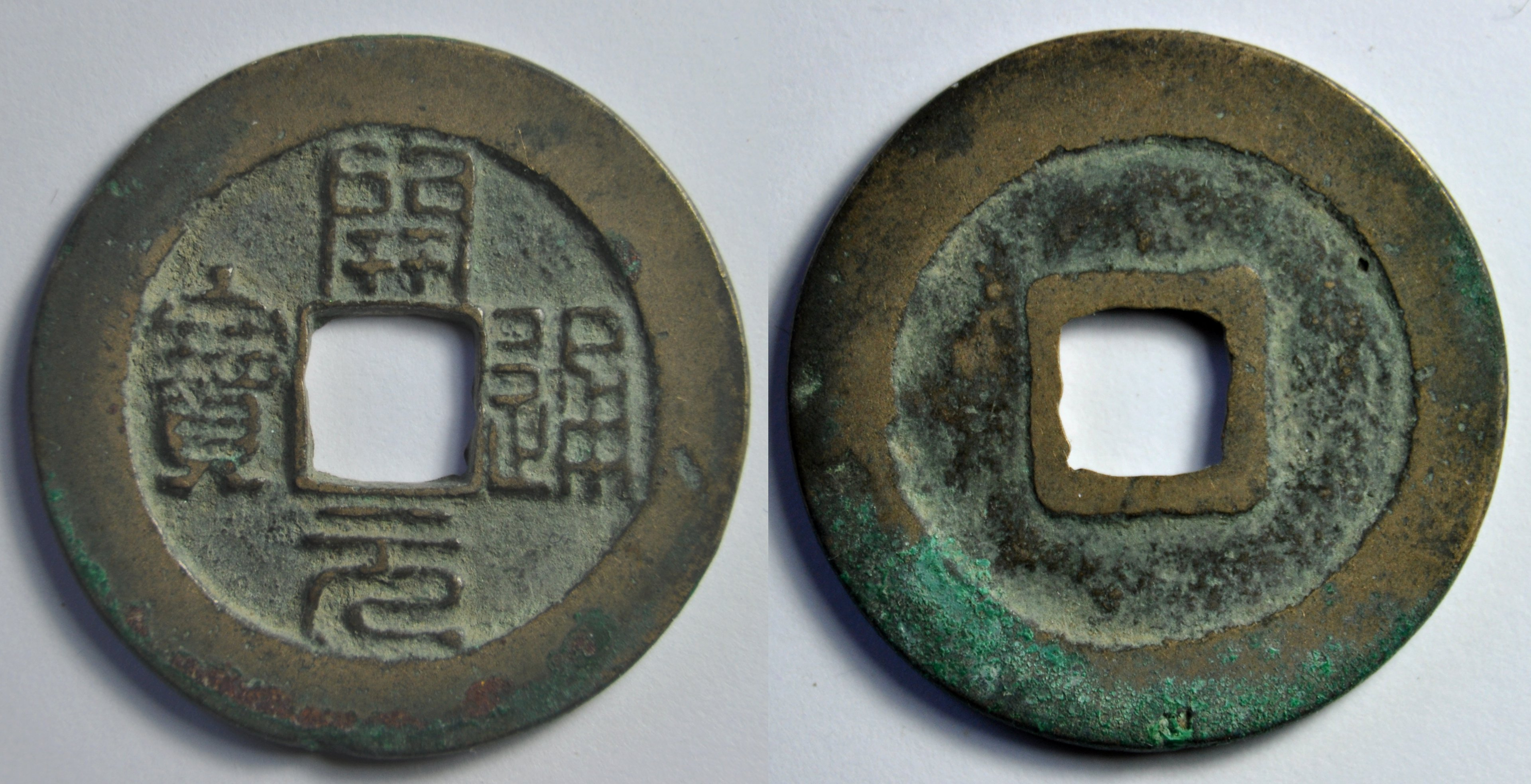 Une monnaie d'une sapèque (1 cash) en bronze de l'empereur Li Yu (961-978) du royaume des Tang du Sud (937-975) ou Nan Tang. L'empereur Li Yu est aussi appelé Li Houzhu. Les Song du Nord envahissent le royaume en 975 et Li Yu finit sa vie en captivité. C'était aussi un poète auteur de poèmes chantés "ci". A/ Kai yuan tong bao (Monnaie courante de l'ouverture de l'ère nouvelle) (Lecture en croix : haut-bas-droite-gauche) R/ vide Dimension : 25.44 mm Poids : 4.7 g. Remarques : La monnaie est écrite en écriture sigillaire et a un large rebord. Elle a été émise à partir de 961. Il s'agit d'un bel exemplaire. Référence : H15.99 Indice de rareté : 14 (Monnaie commune) (D'après D. Hartill) Chine monnaie Tang du Sud Monnaies de la dynastie des Tang du Sud (937-975)